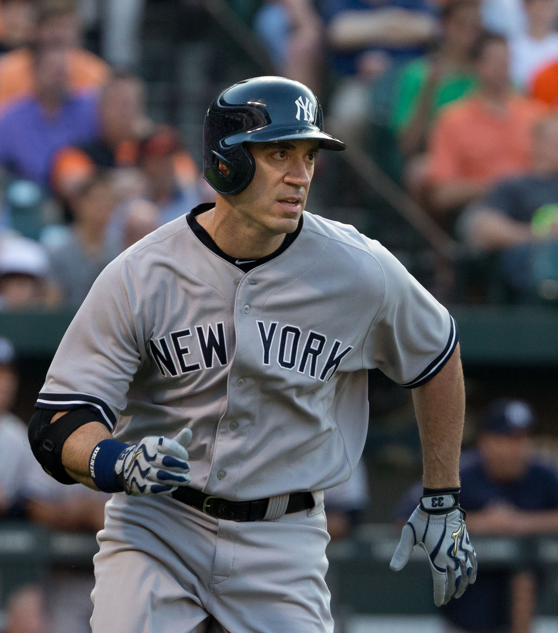 Travis Hafner